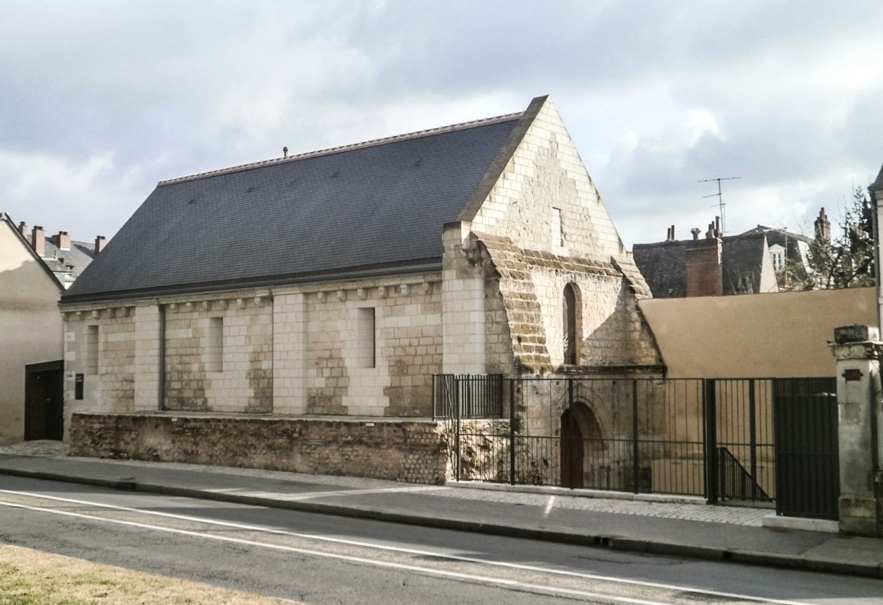 Chapelle Saint-Libert (Tours) tous travaux terminés